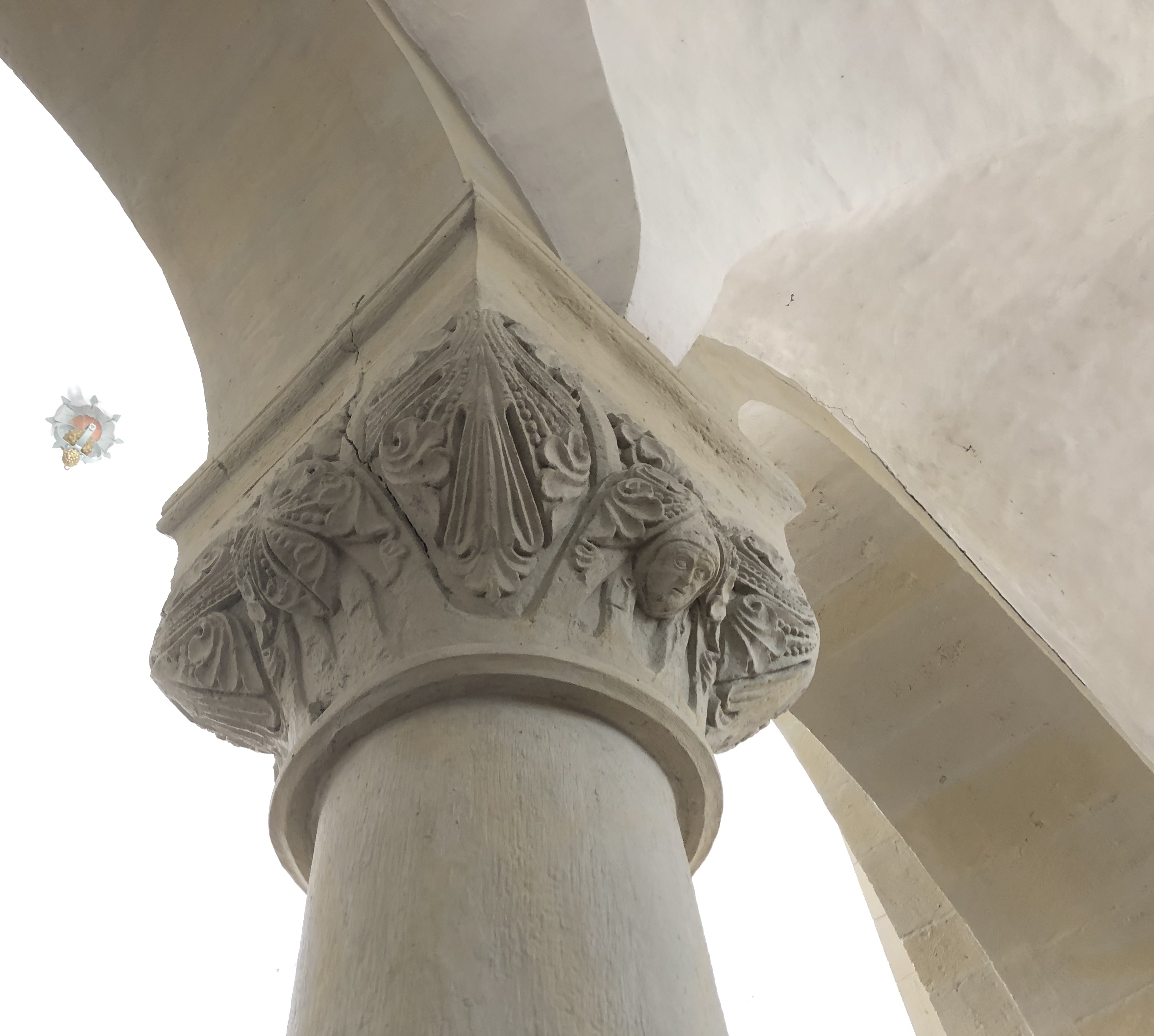 Das Bild zeigt ein romanisches Architekturdetail aus der früheren Klosterkirche in Heiningen (Niedersachsen).